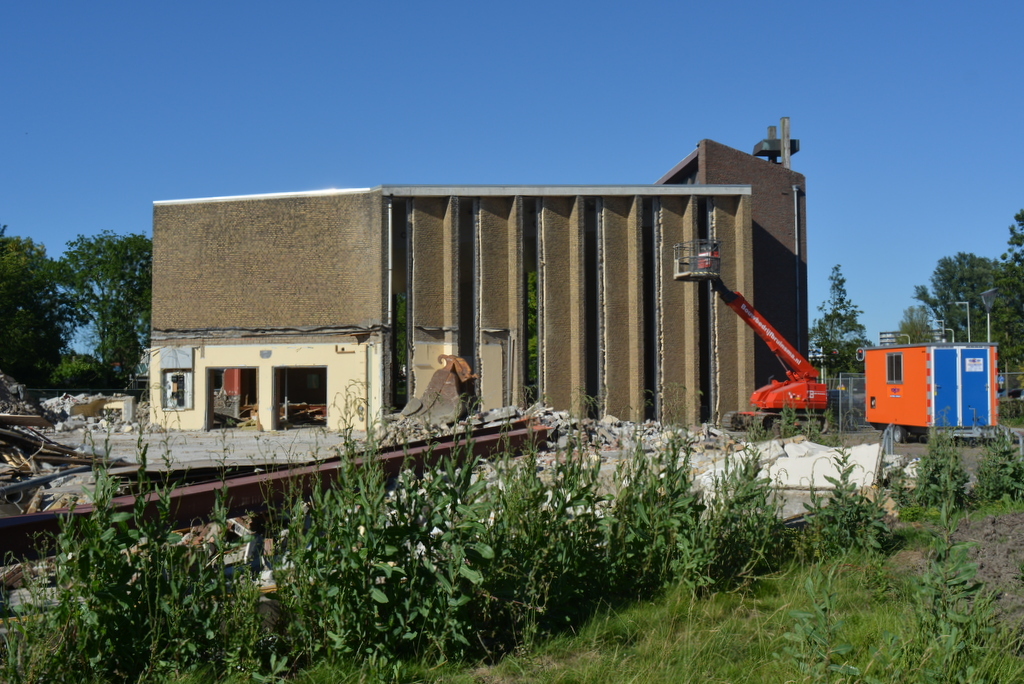 Ljouwert, Fenikstsjerke (ôfbraak 2018)